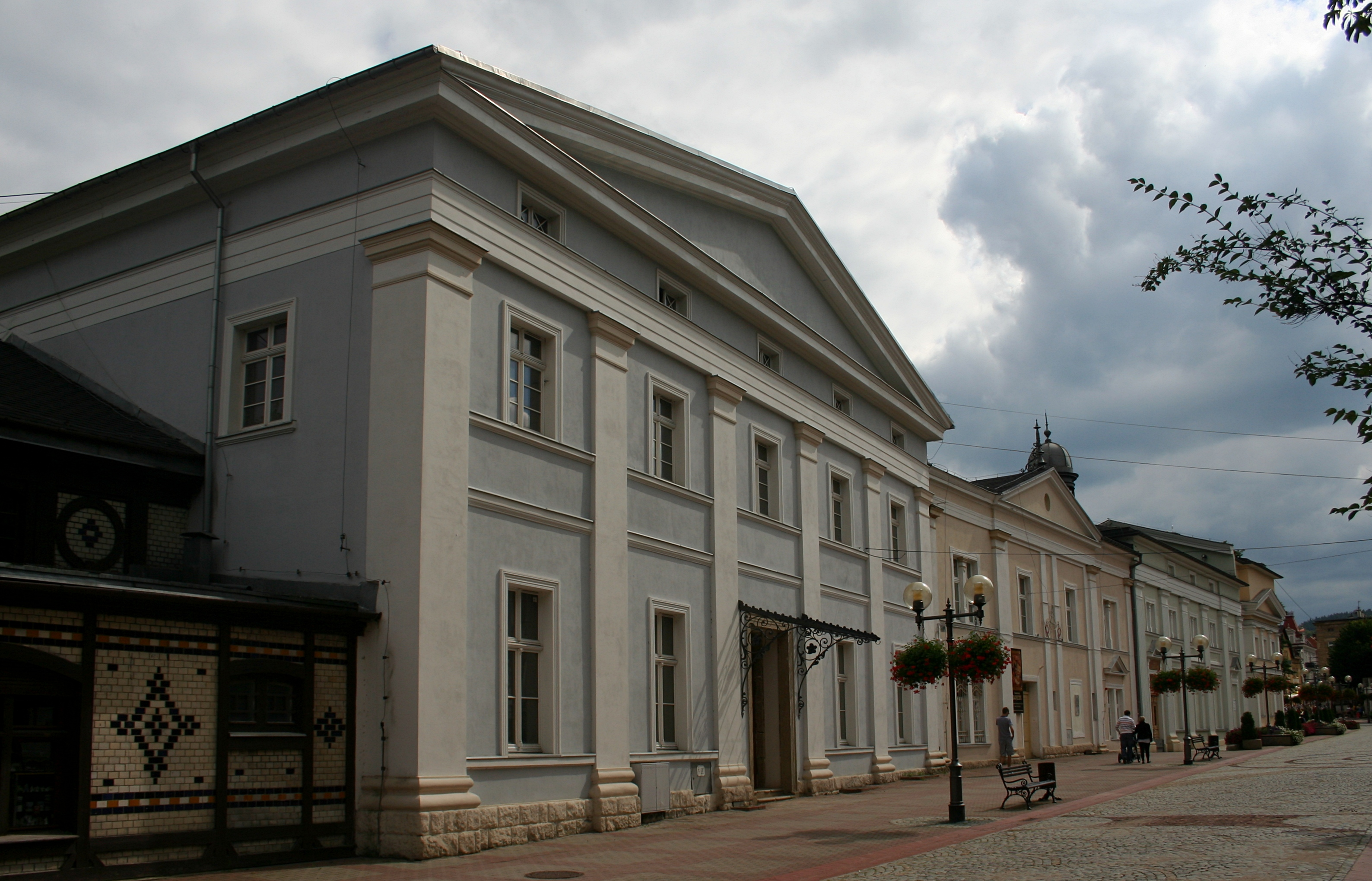 Teatr Zdrojowy w Szczawnie-Zdroju